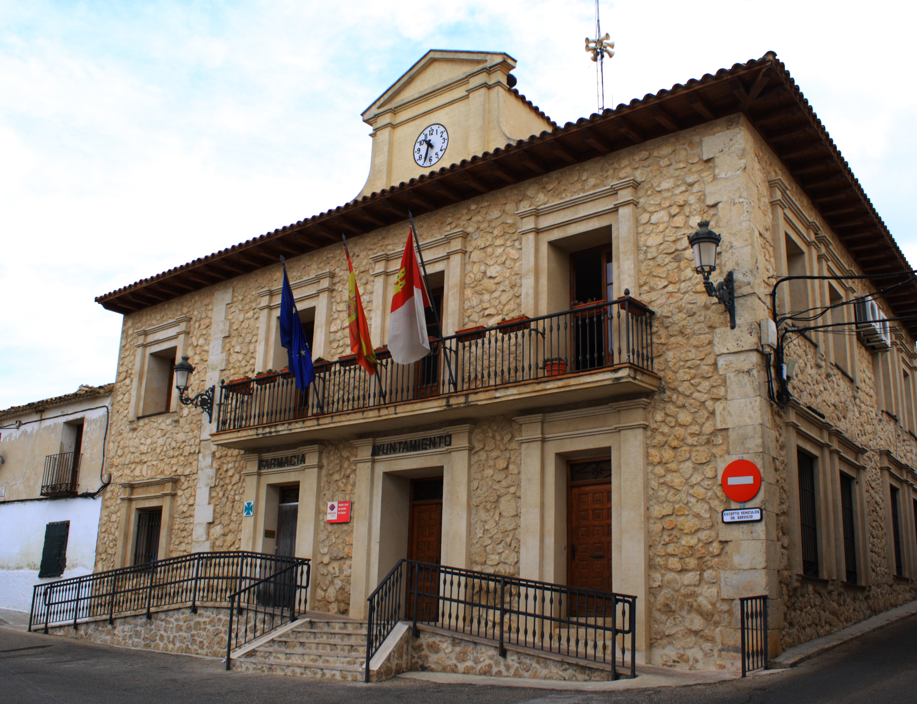 Ayuntamiento y farmacia Albalate de Zorita Provincia de Guadalajara Castilla-La Mancha España